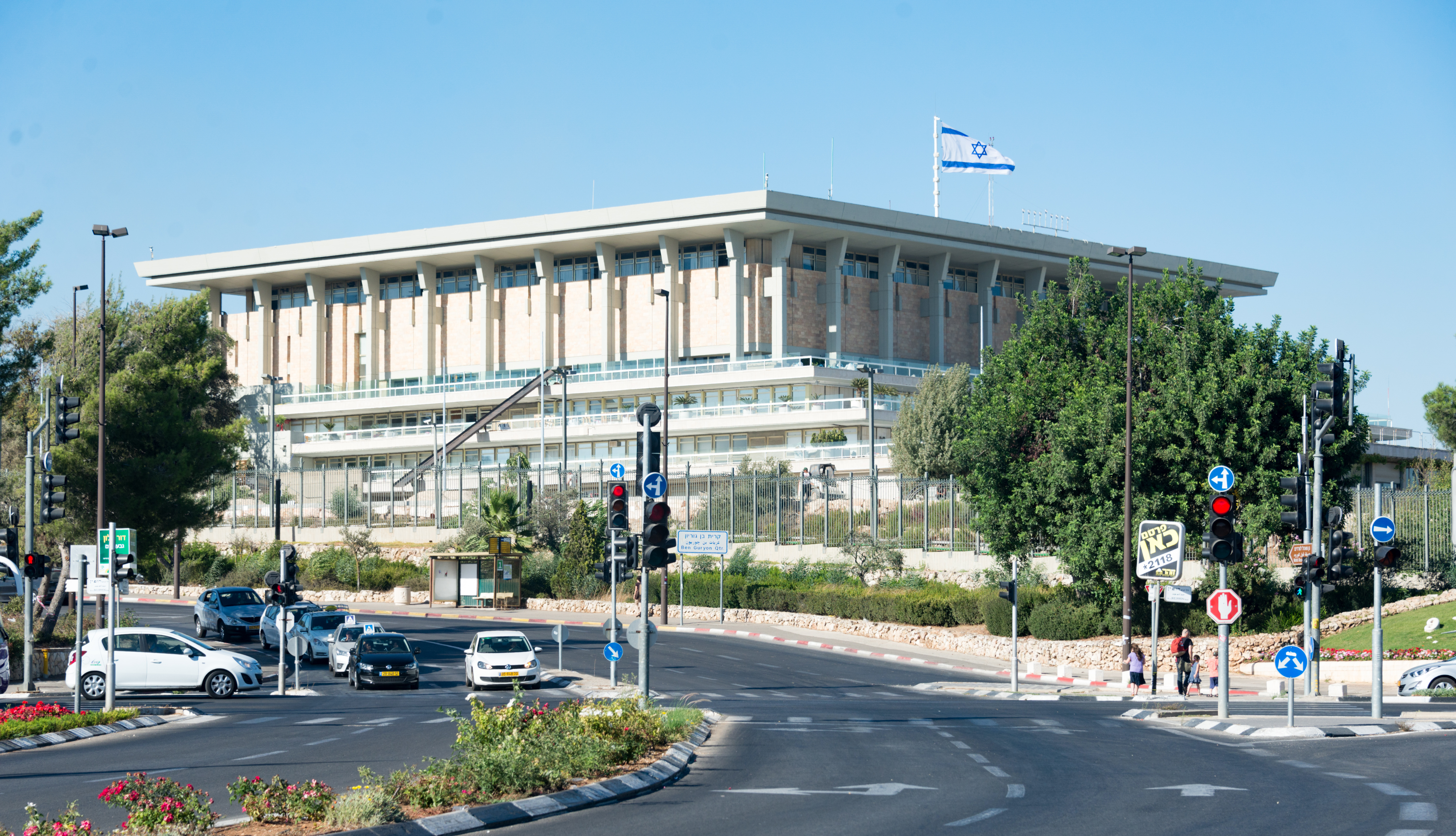 Israel Museum Jerusalem